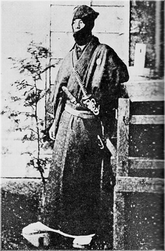 a Japanese man 陸奥宗光 (Munemitsu Mutsu)